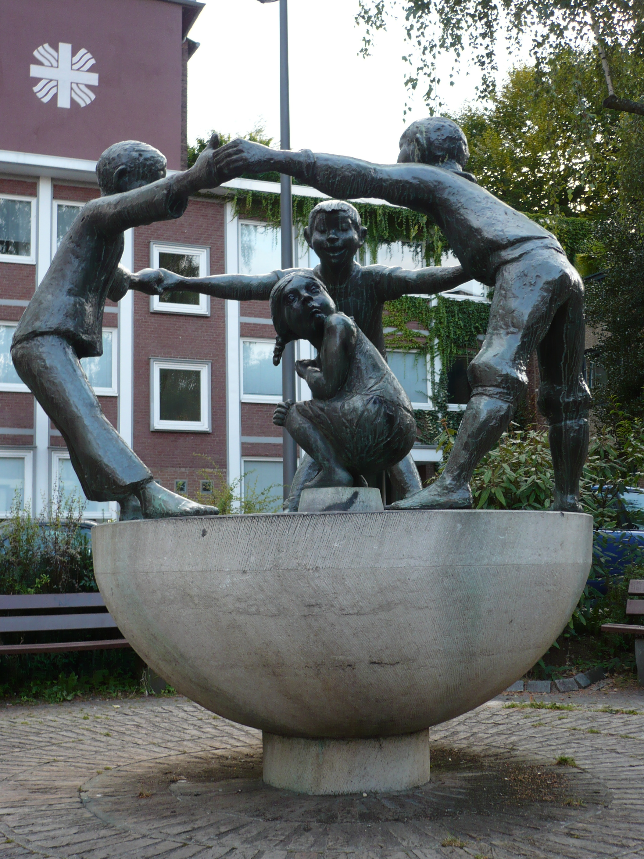 Türelüre-Lißje-Brunnen von Hubert Löneke, Aachen